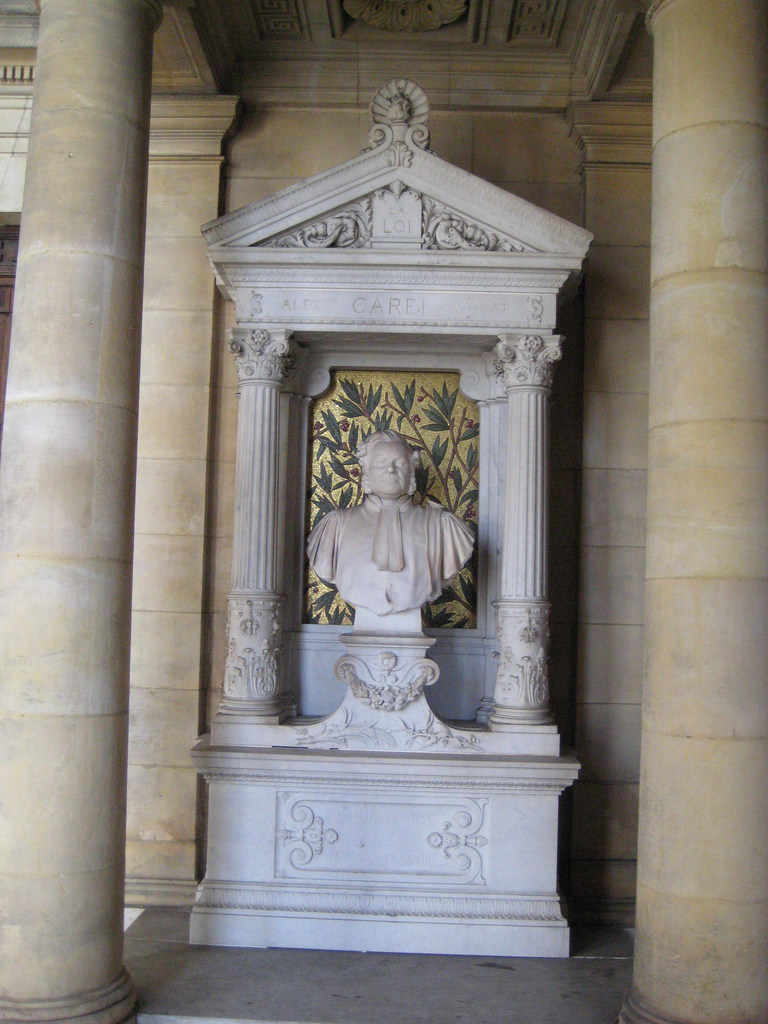 Monument à Alexandre Carel dans le palais de justice de Caen. Buste sculpté par le sculpteur caennais Charles Lemarquier. Le décor a été dessiné par l’architecte Auguste Nicolas et exécuté par la maison Jacquier.